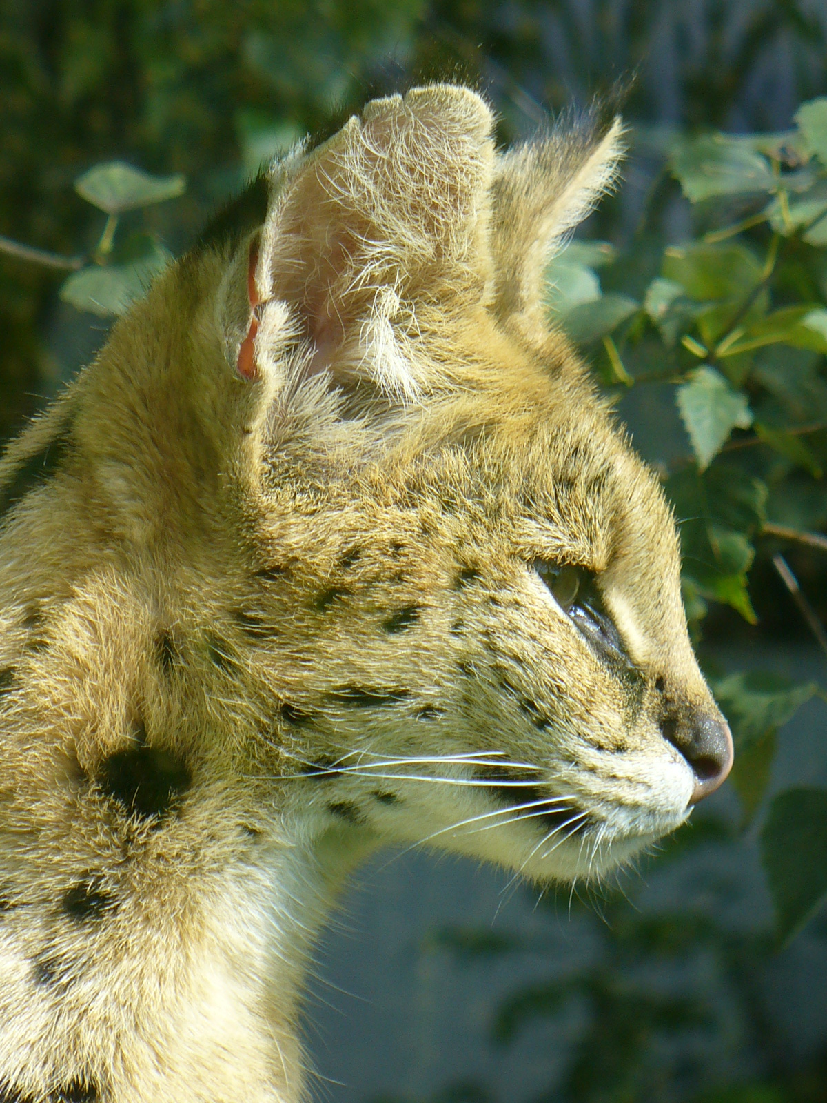 Serval (Leptailurus serval) in zoo Opole (Upper Silesia)/ Serval (Leptailurus serval) in Tiergarten in Oppeln (Oberschlesien)